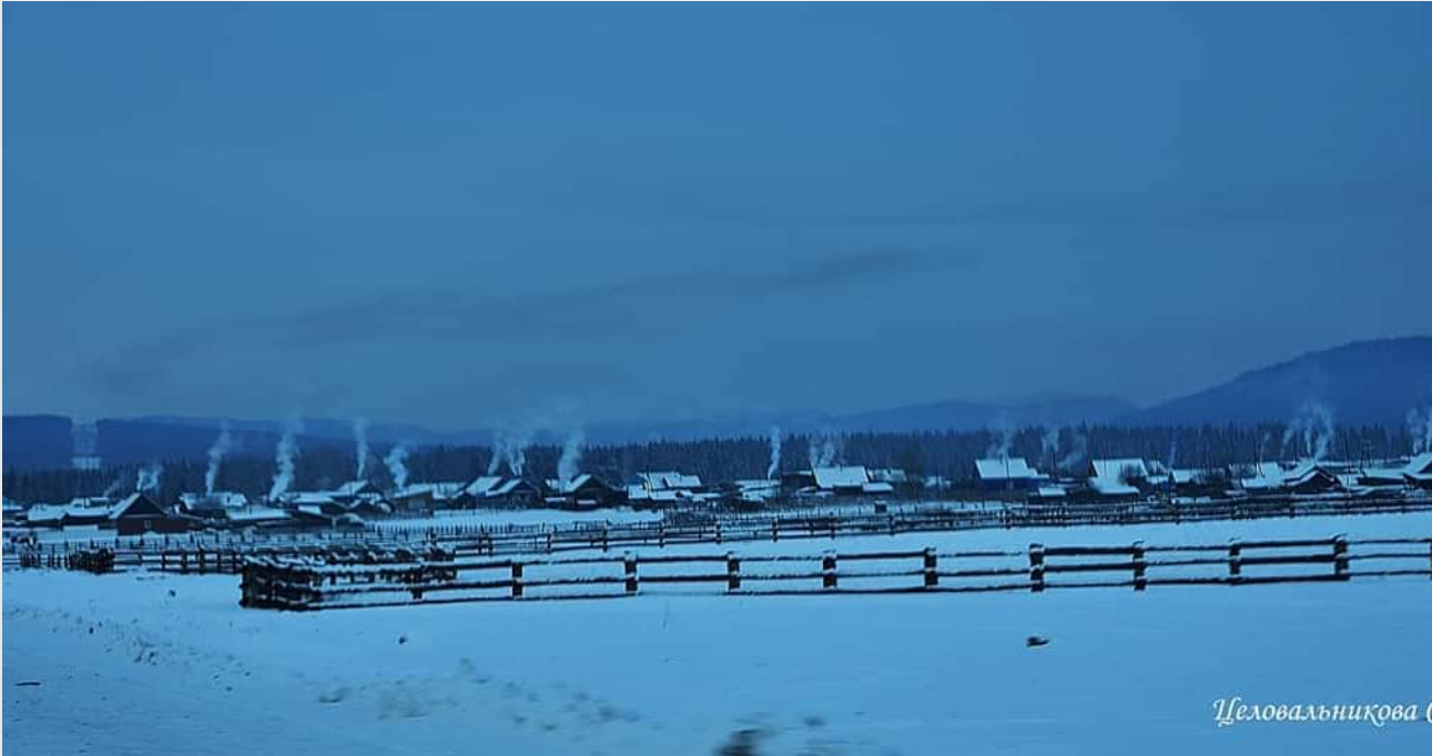 Село Харбяты зимой